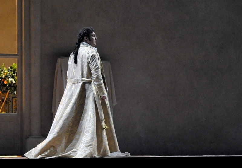 Opéra de Madrid, Nozze di Figaro, Il Conte d'Almaviva